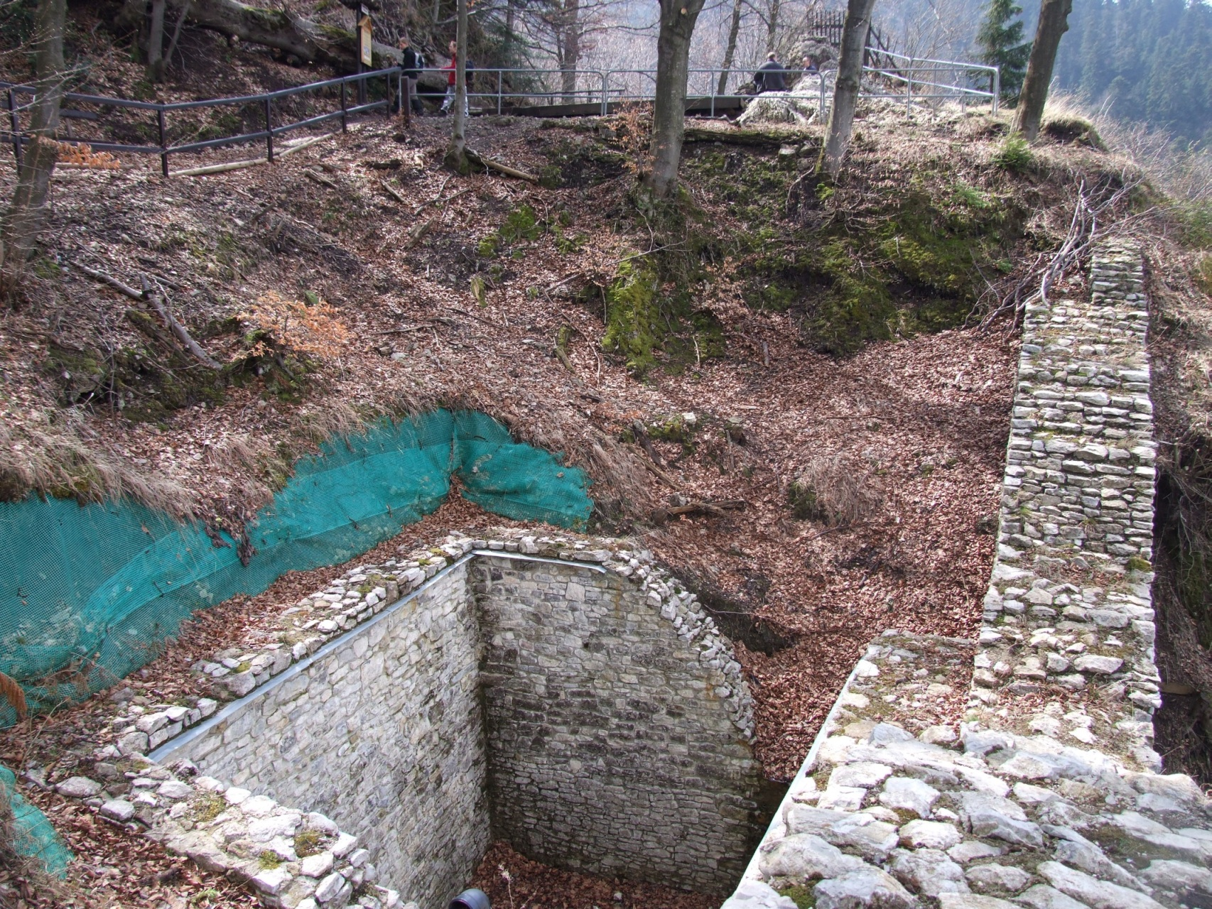 Fragment murów Zamku Pienińskiego